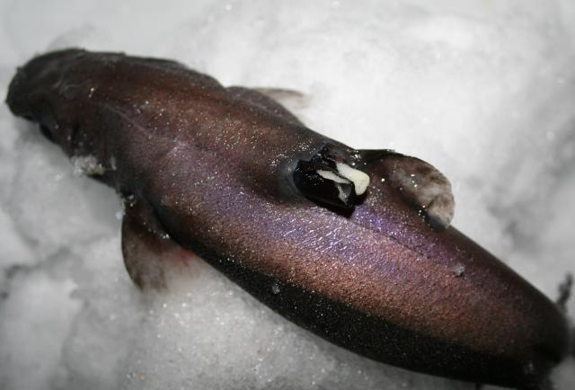 Etmopterus spinax